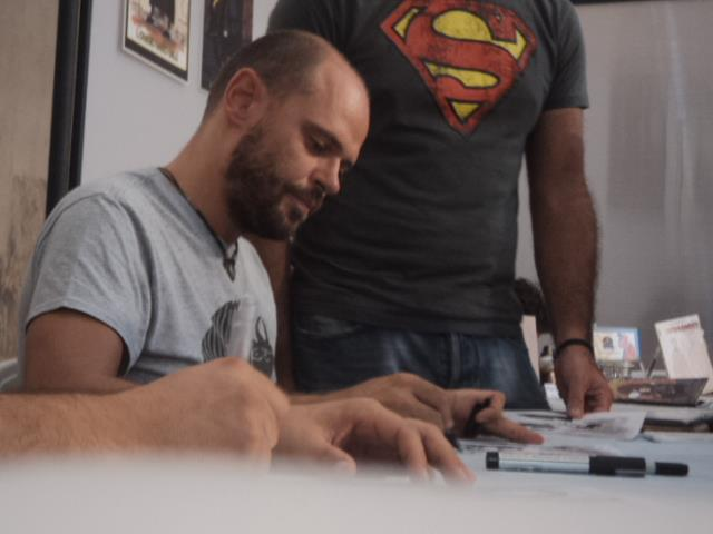 Narnia Fumetto 2012.